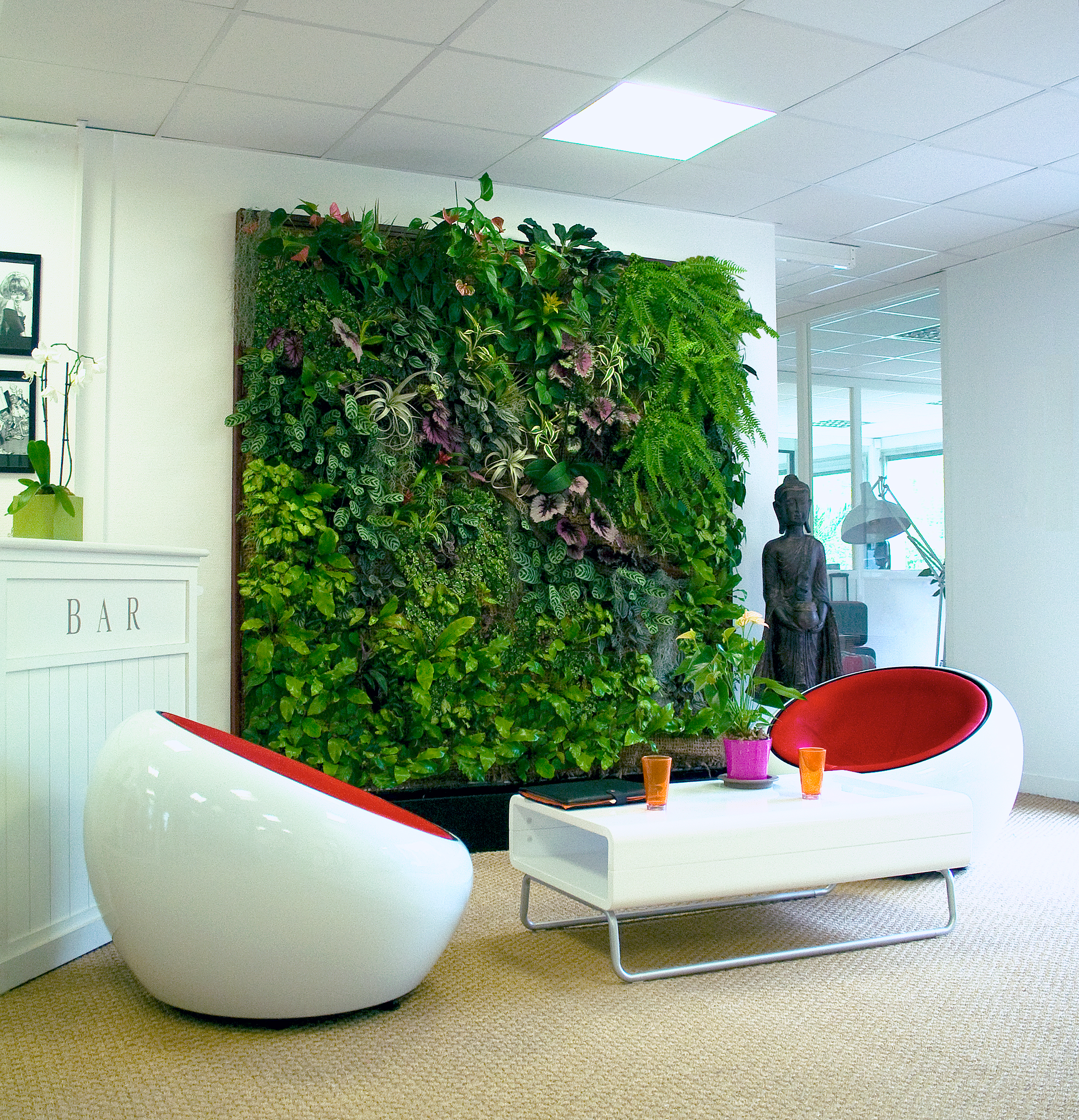 Mur végétal Intérieur de l'entreprise Urban Garden.